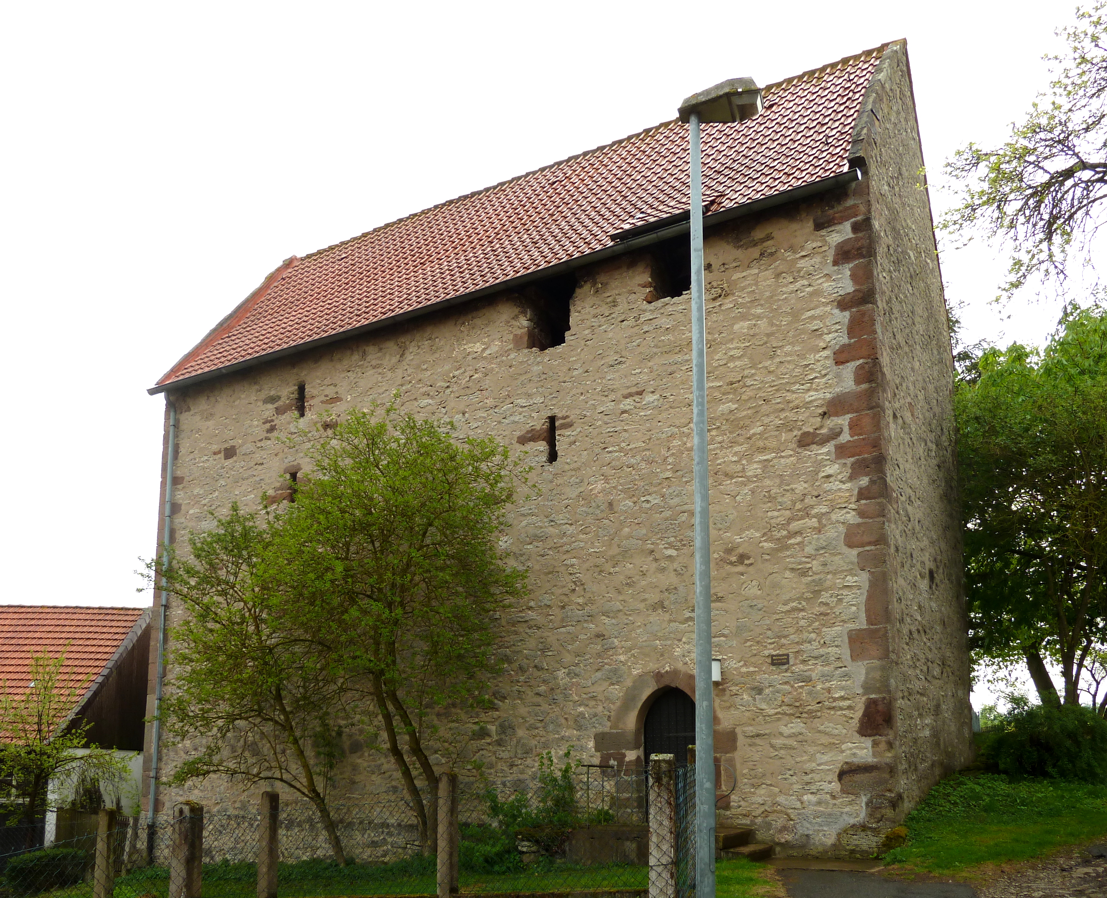 Wehrkapelle St. Johannis in Nienhagen, Stadt Moringen, Landkreis Northeim, Südniedersachsen. Erbaut um 1300. Ansicht von Norden